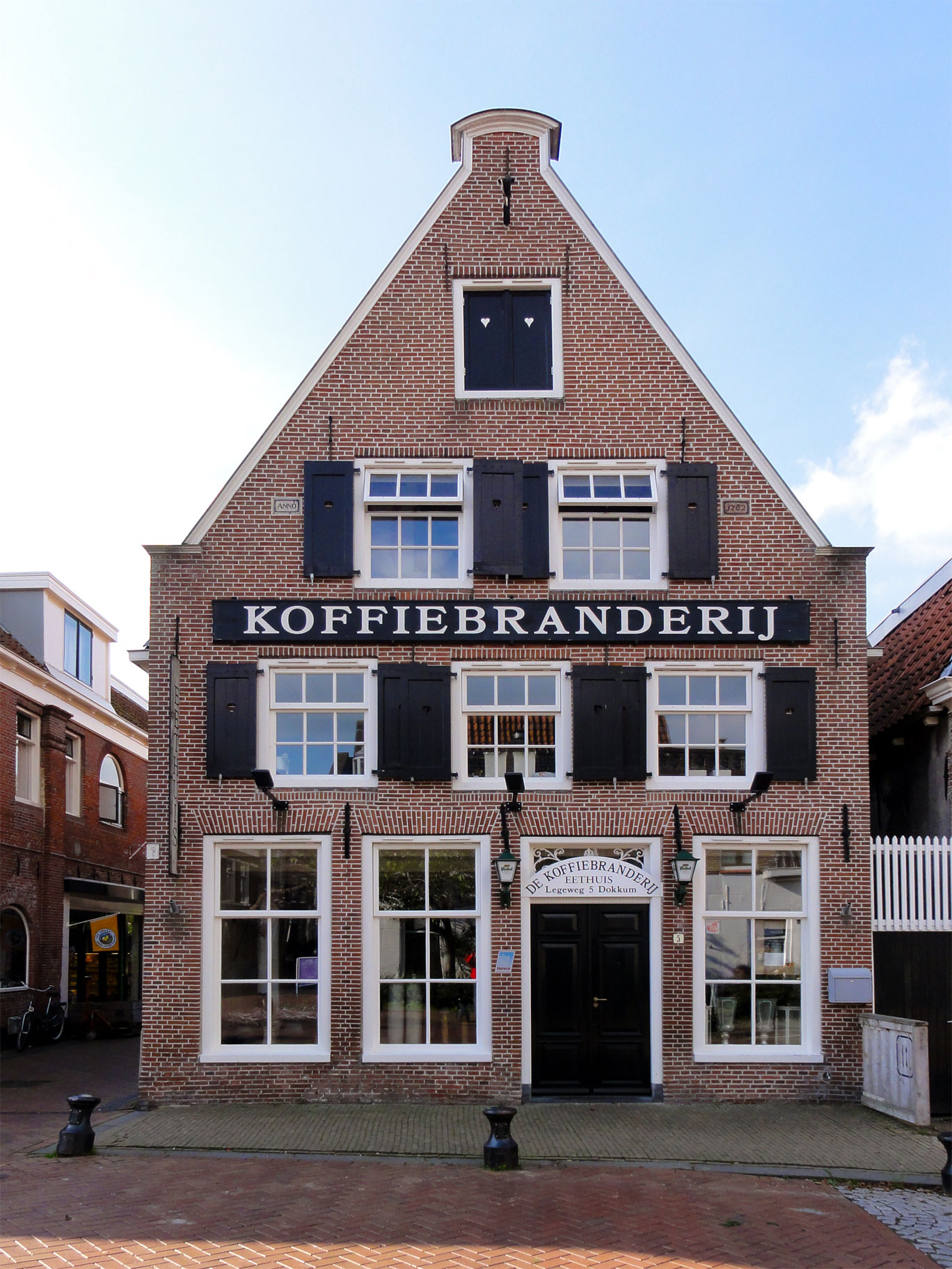 Legeweg 5 Dokkum, rijksmonument